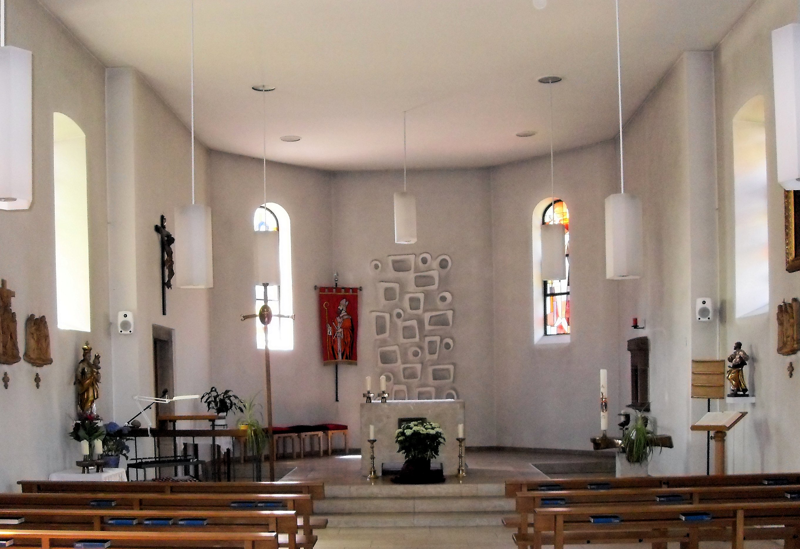 Innenansicht der Kirche St. Blasius in Gempen, Kanton Solothurn, Schweiz